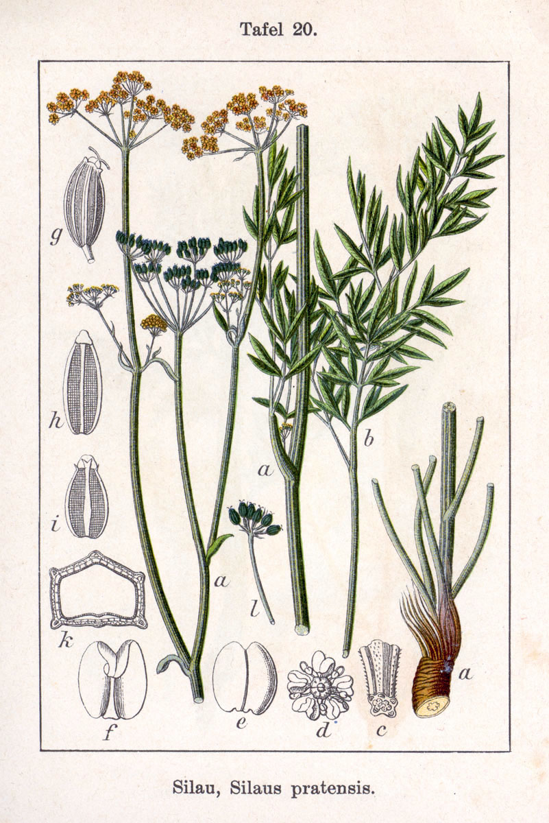 Silaum silaus (L.) Schinz & Thell, syn. Silaus flavescens (Bernh.) Hayek, Silaus pratensis Besser Original Description Silau, Silaus pratensis